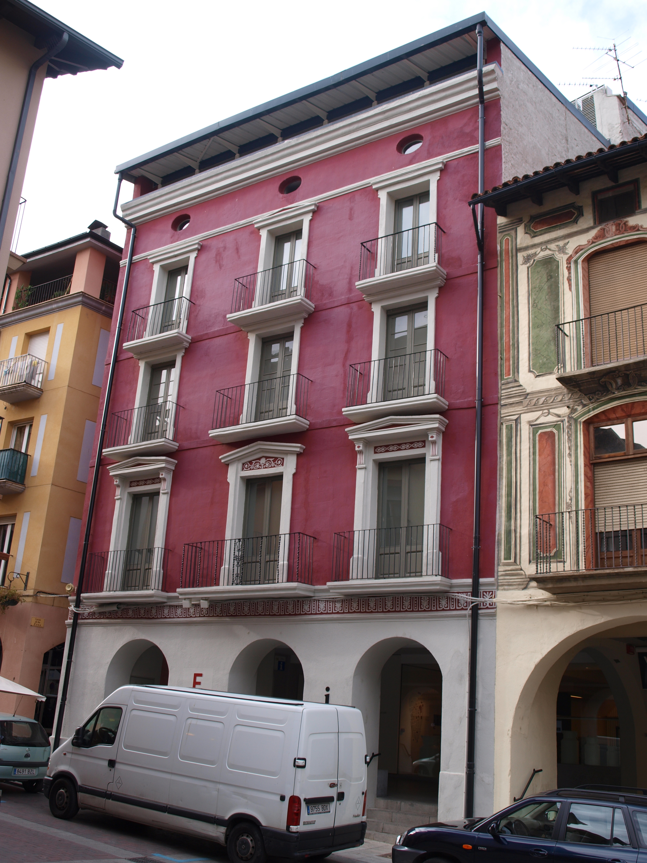 Can Mossèn Poldo (la Seu d'Urgell)